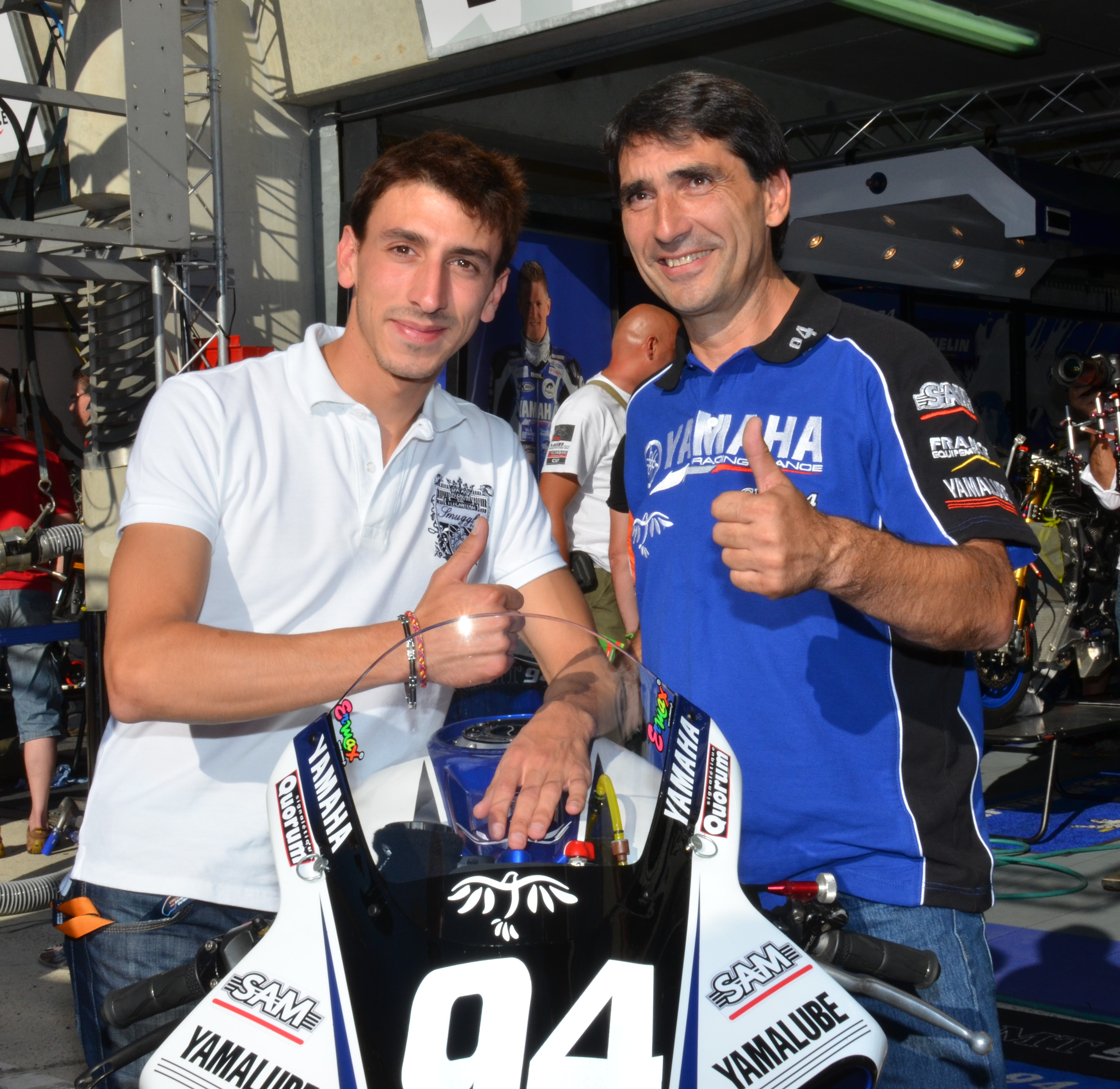 24 heures du Mans moto 2012